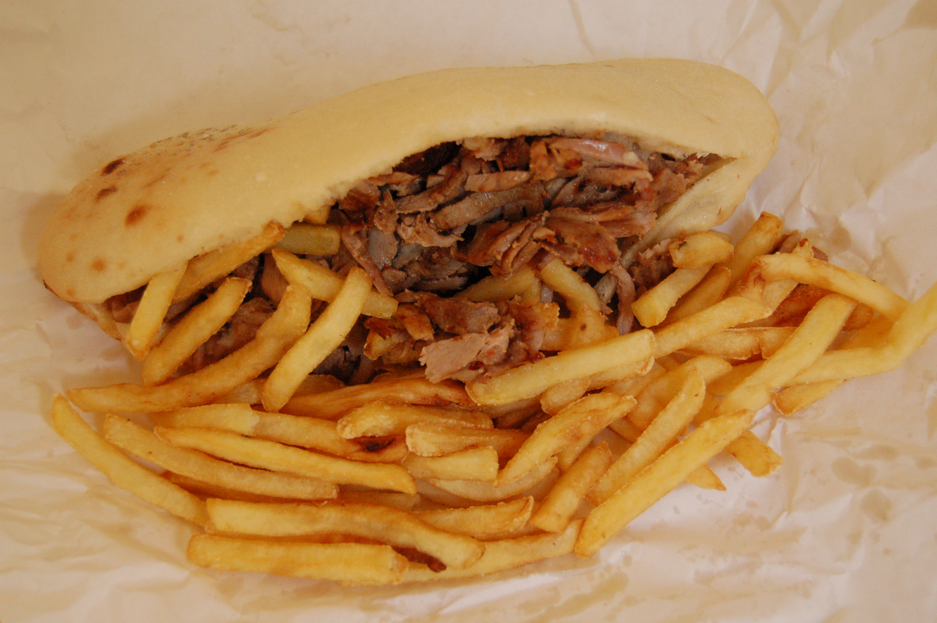 Döner kebab